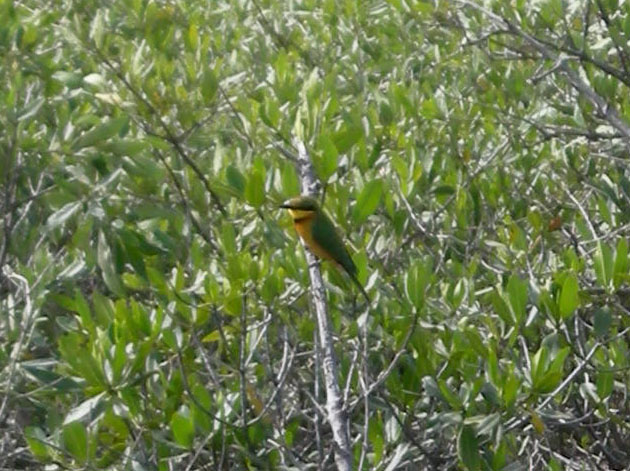 Guêpier nain sur un palétuvier (île de Karabane, Casamance, Sénégal)